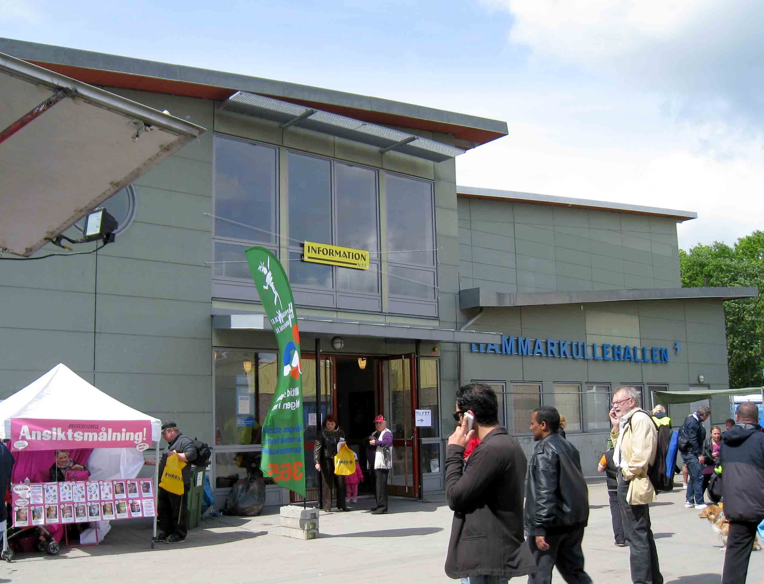 Hammarkullehallen, Hammarkullen, Göteborg